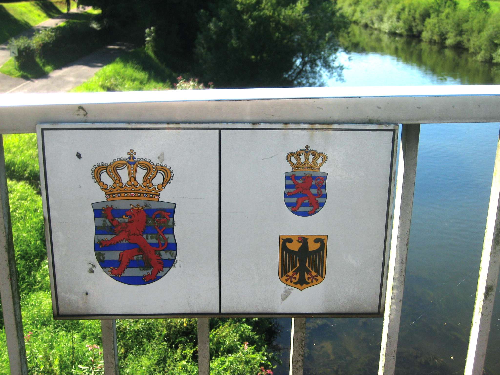 Schëld op der Foussgängerbréck zu Iechternach iwwer de Grenzfloss Sauer, dat déi däitsch-lëtzebuergesch Grenz ugëtt: lénks, um Uwänner, lëtzebuergeschen Territoire, riets, de Floss, ass en däitsch-lëtzebuergesche Kondominium. (August 2009).